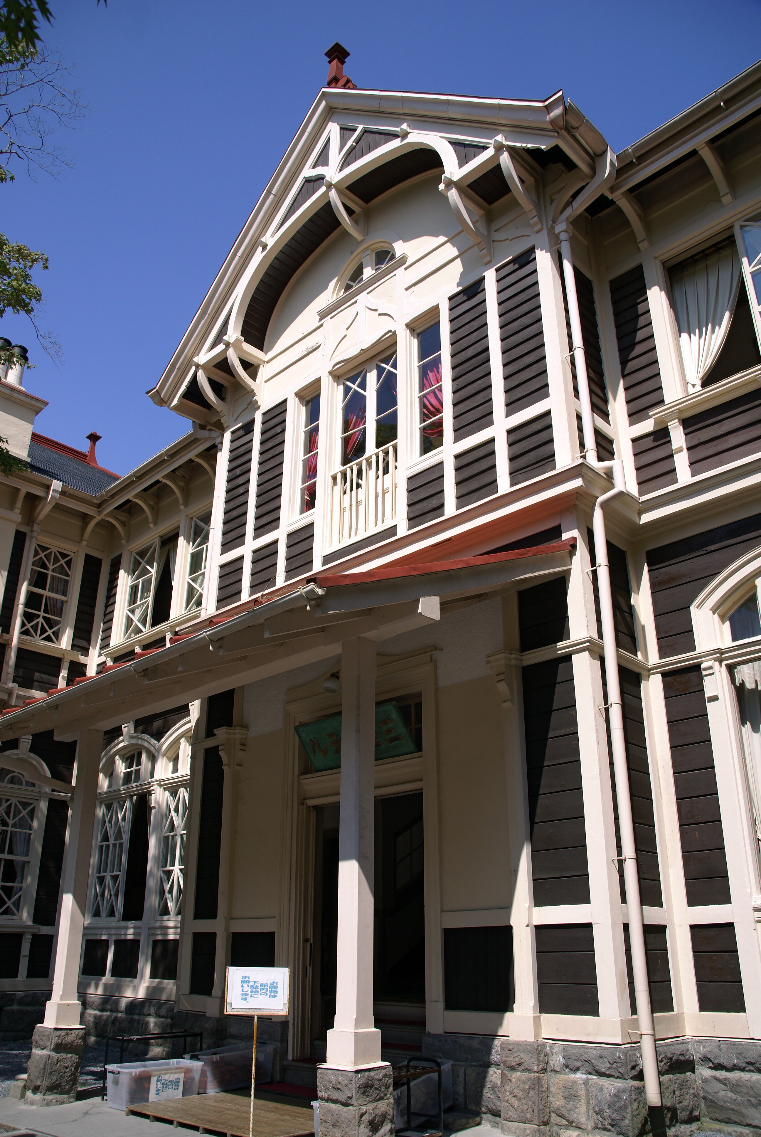 Old Mikasa Hotel in Karuizawa, Japan